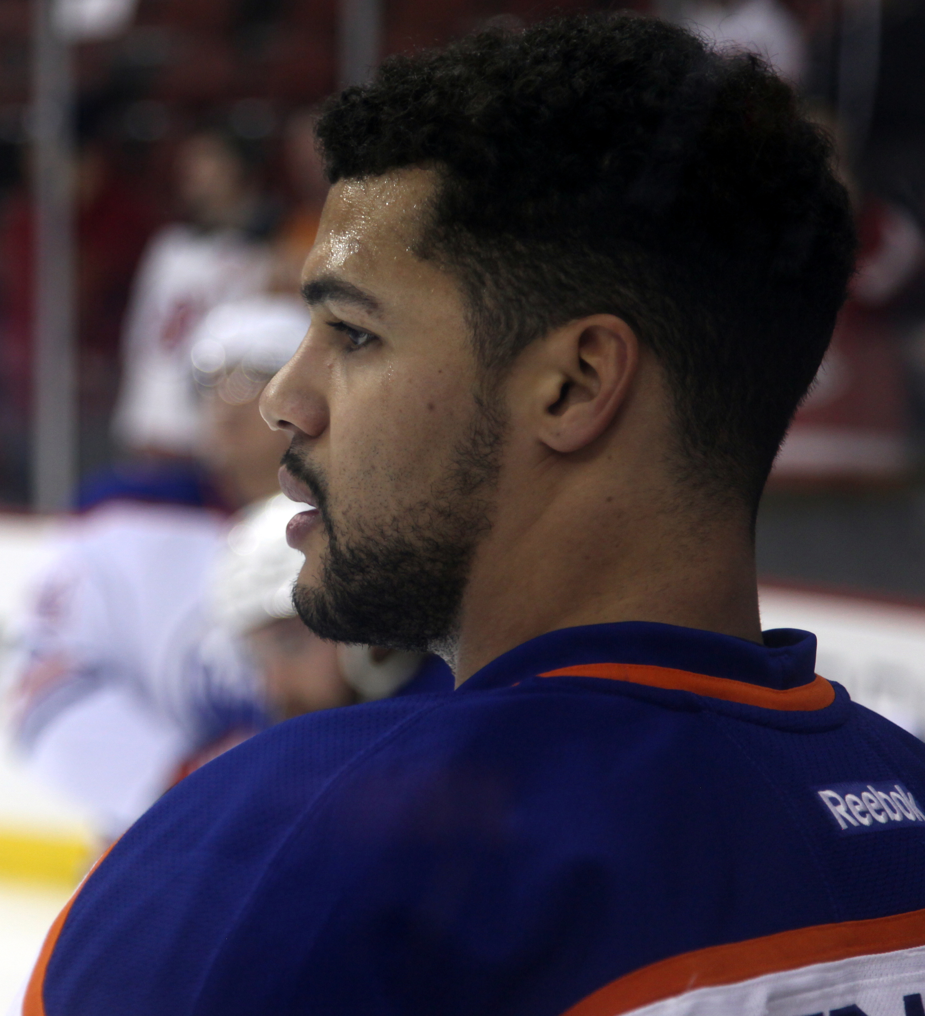 Fraser in 2014.